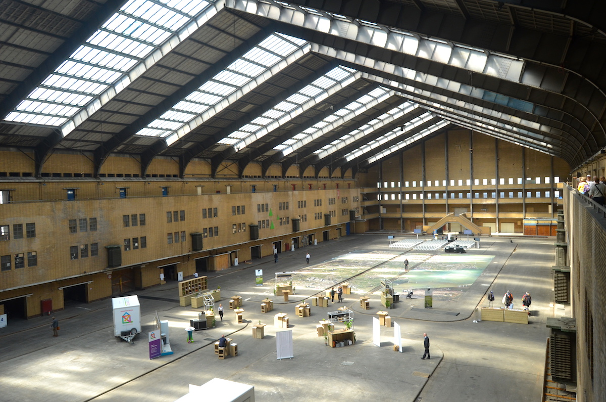 Centrale Markthal te Amsterdam-West - interieur (1); juni 2019. Foto: Erik Swierstra.